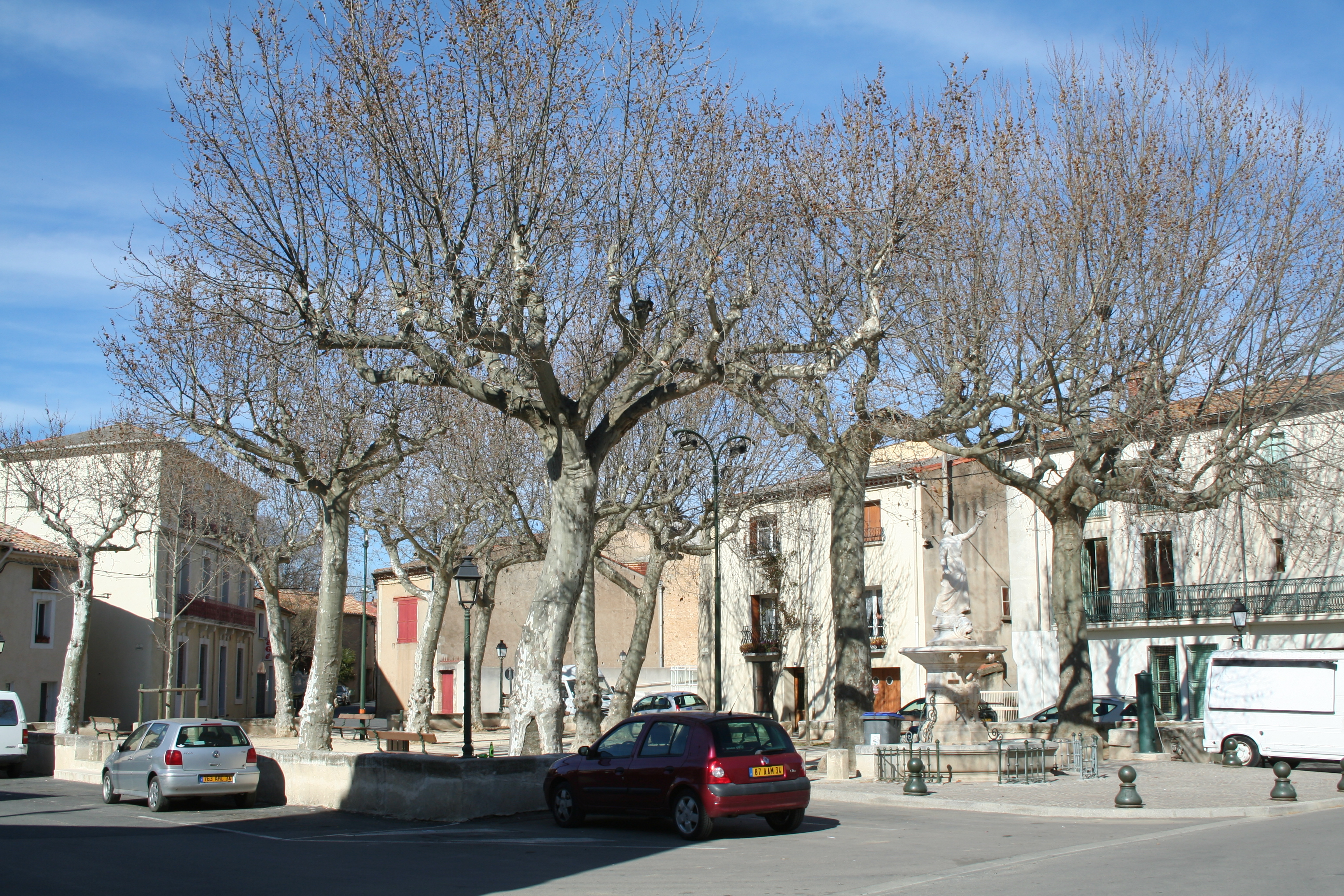 Lieuran-lès-Béziers (Hérault) - place.